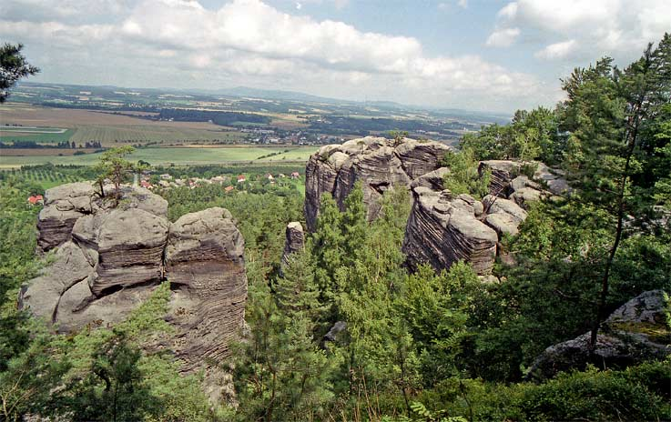 Příhrazské skály u Drábských světniček autor:Zp